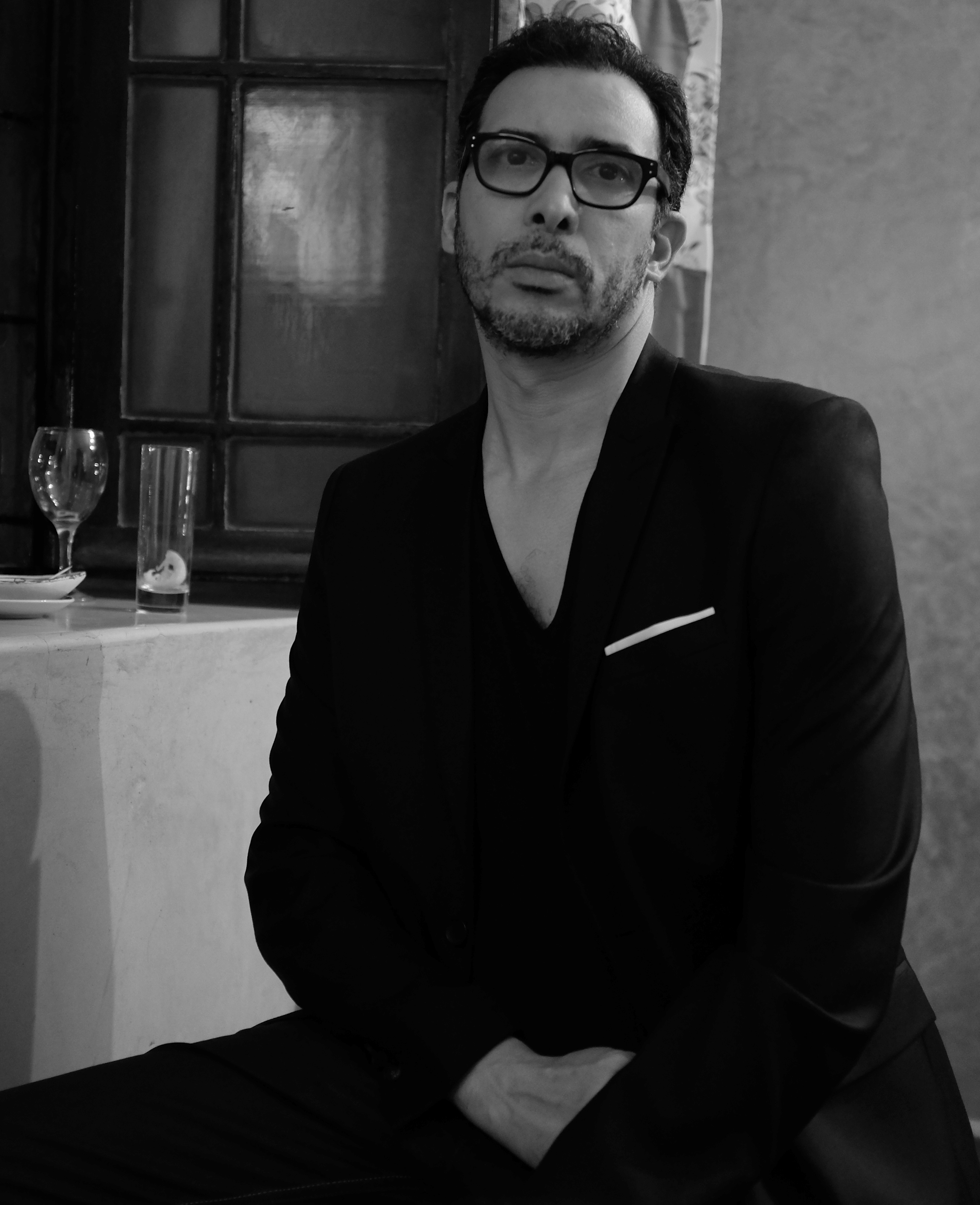 mounir fatmi